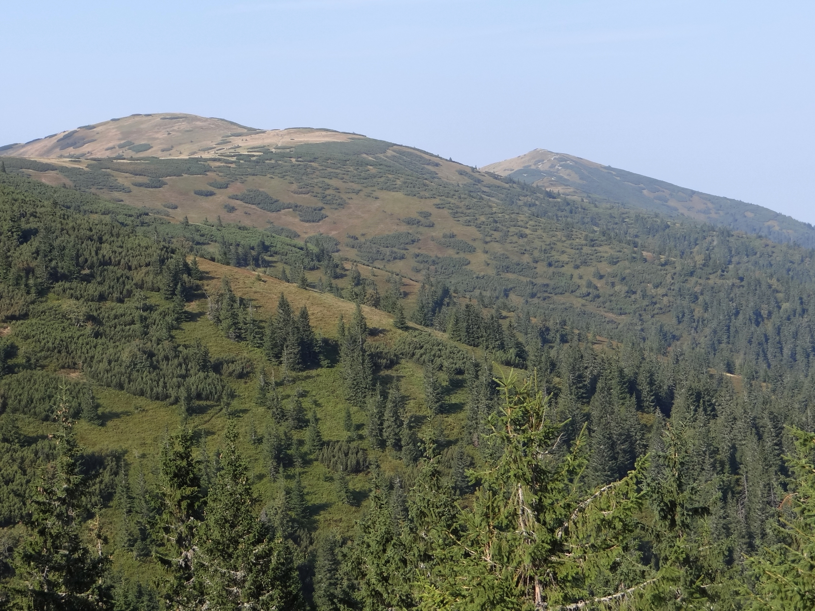 Latiborská hoľa i Veľká hoľa. Widok od północy (z żółtego szlaku z Magurki)